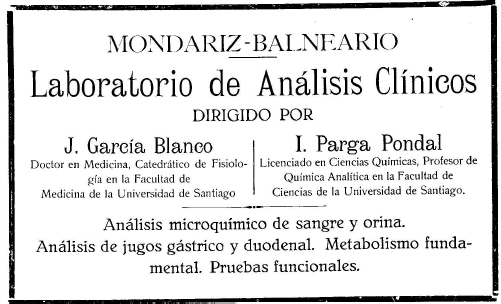 Reseña del Laboratorio de análisis clínicos de Mondariz de 1928